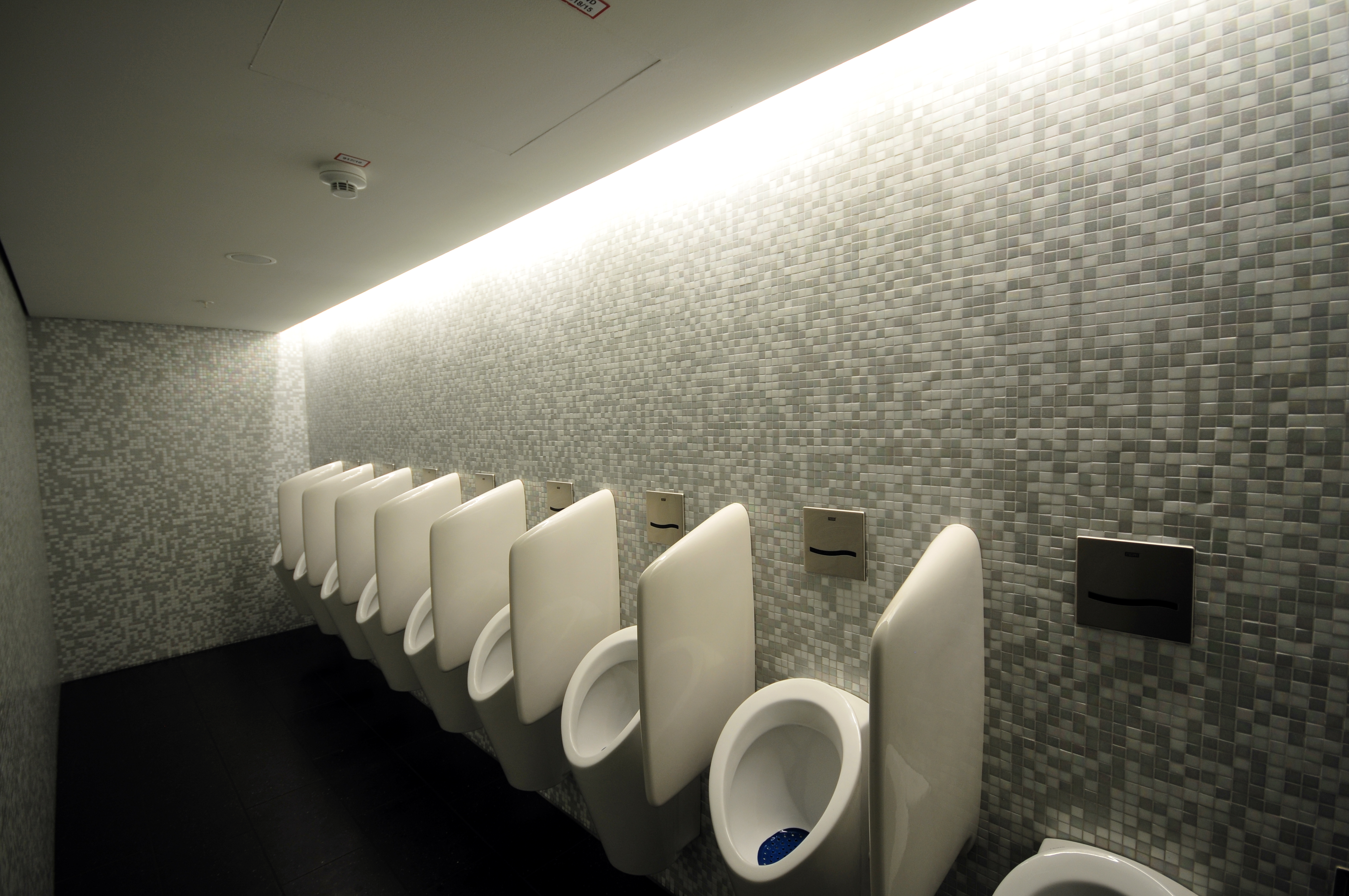 Landeanflug Wien-Schwechat